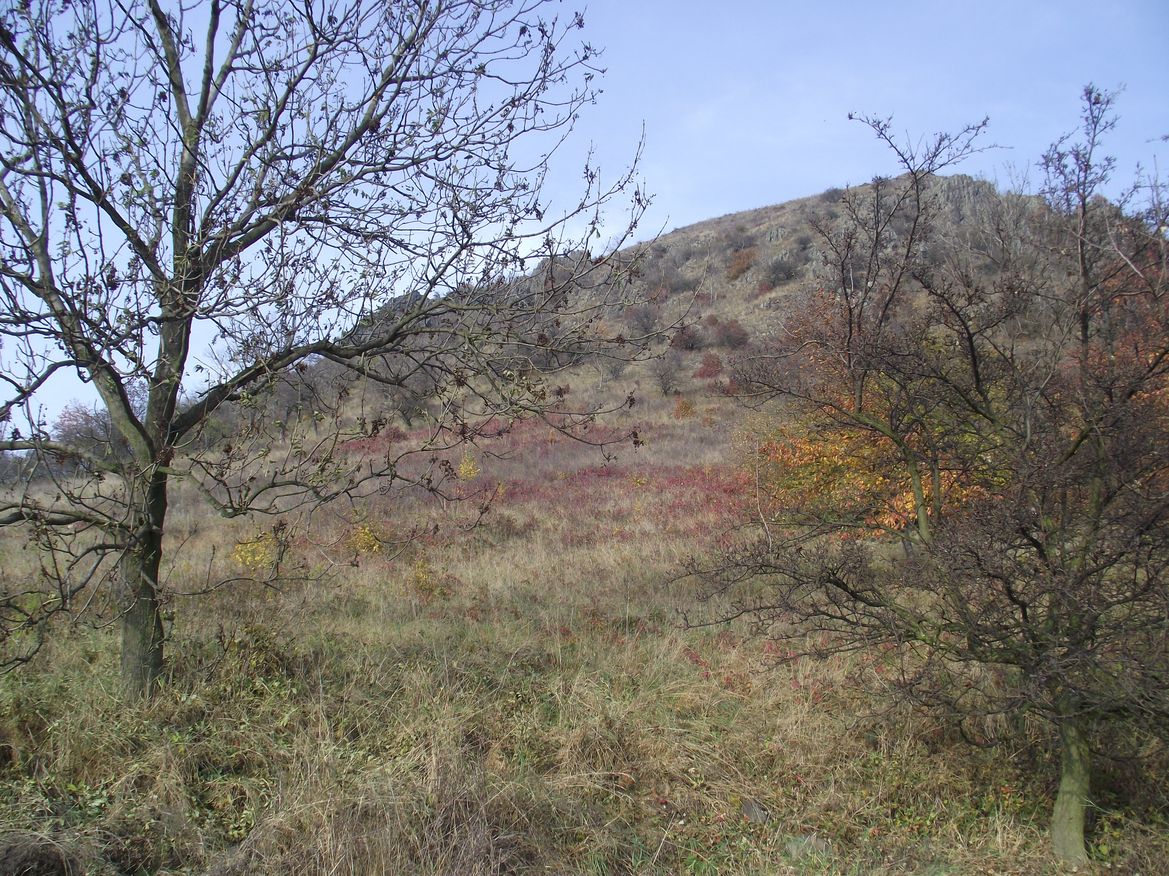 JV svah